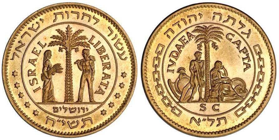 המדליה הרשמית הראשונה של מדינת ישראל - חירות ישראל